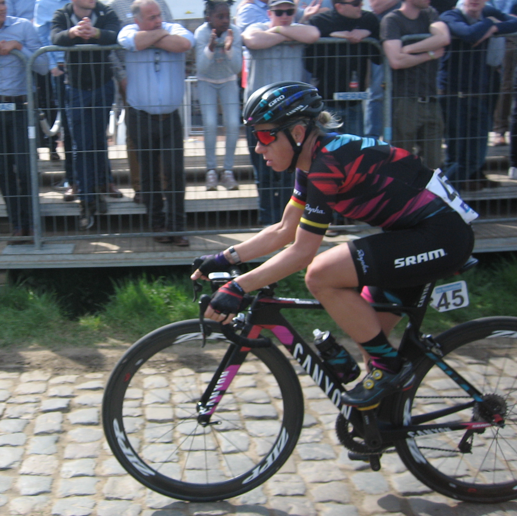 Trixi Worrack op de Oude Kwaremont in de Ronde van Vlaanderen voor vrouwen 2017.